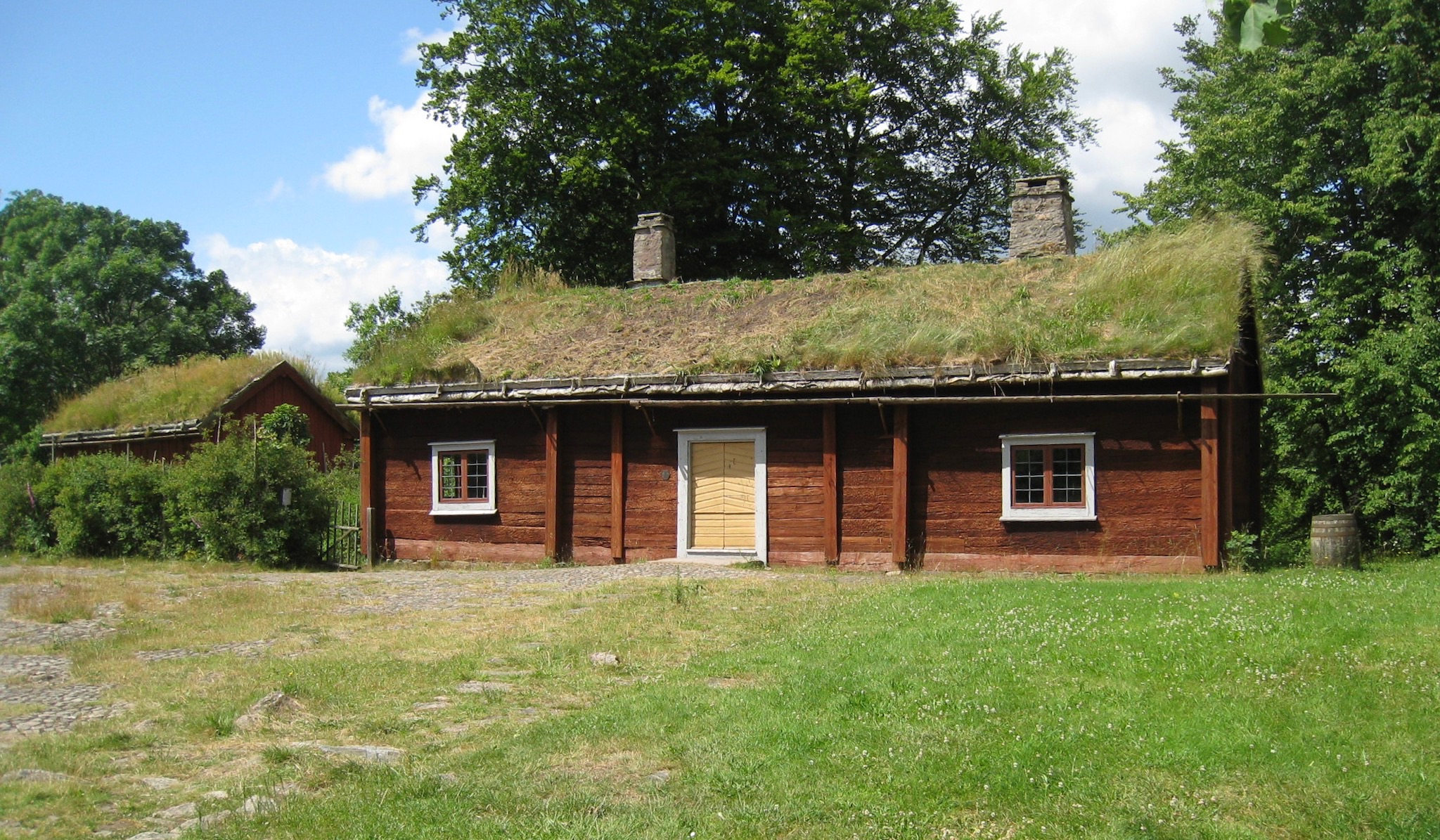 Linnés Råshult, Linnéstugan och sädesmagasinet. Gården Råshult i Stenbrohults socken i Småland är känt som Carl von Linnés hembygd. Stenbrohults socken ingick i Allbo härad i Värend.